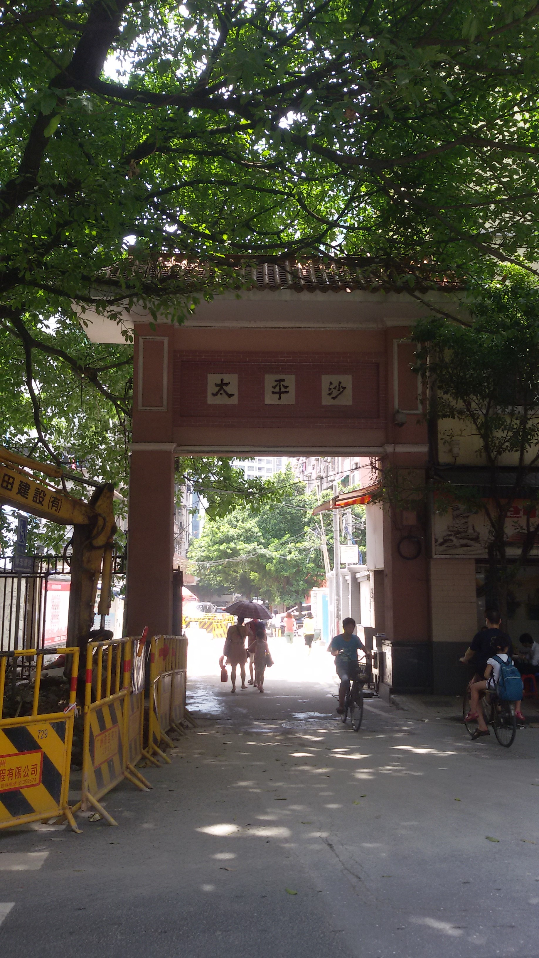 粵語: 太平沙嘅东牌坊